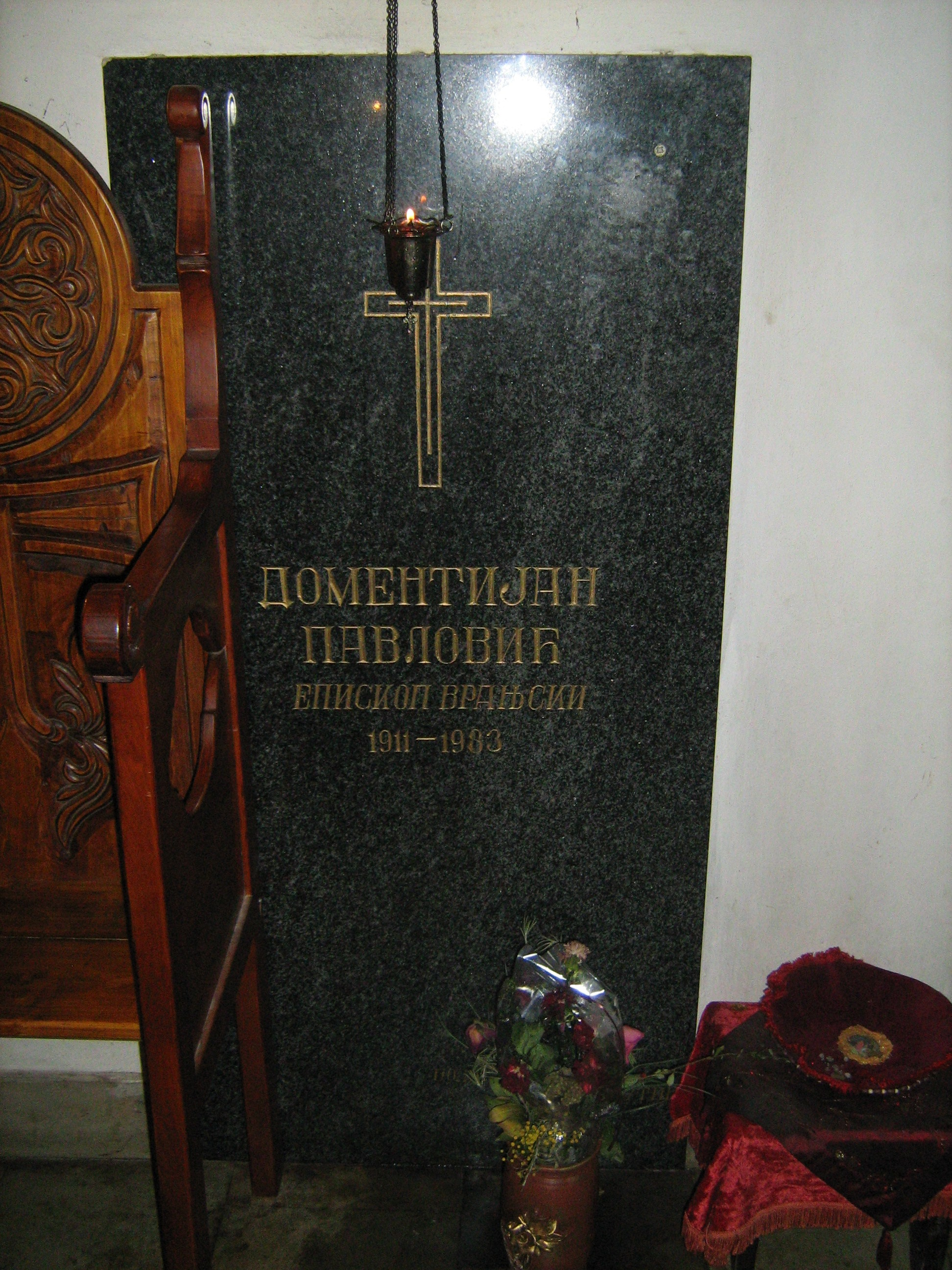 Saborna crkva u Vranju - grob episkopa Domentijana